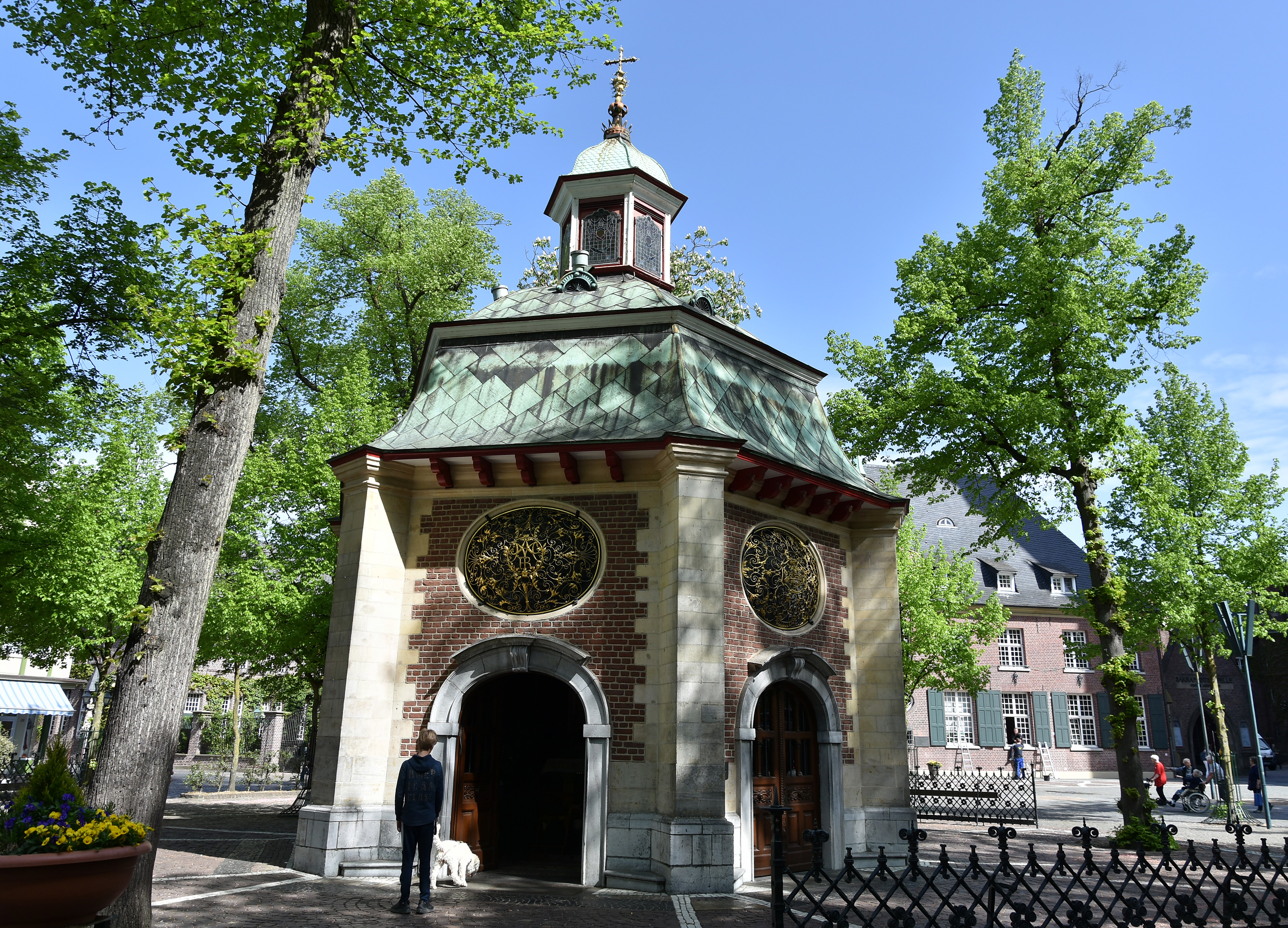 Genadekapel Kevelaer 24-04-2019 11-46-50